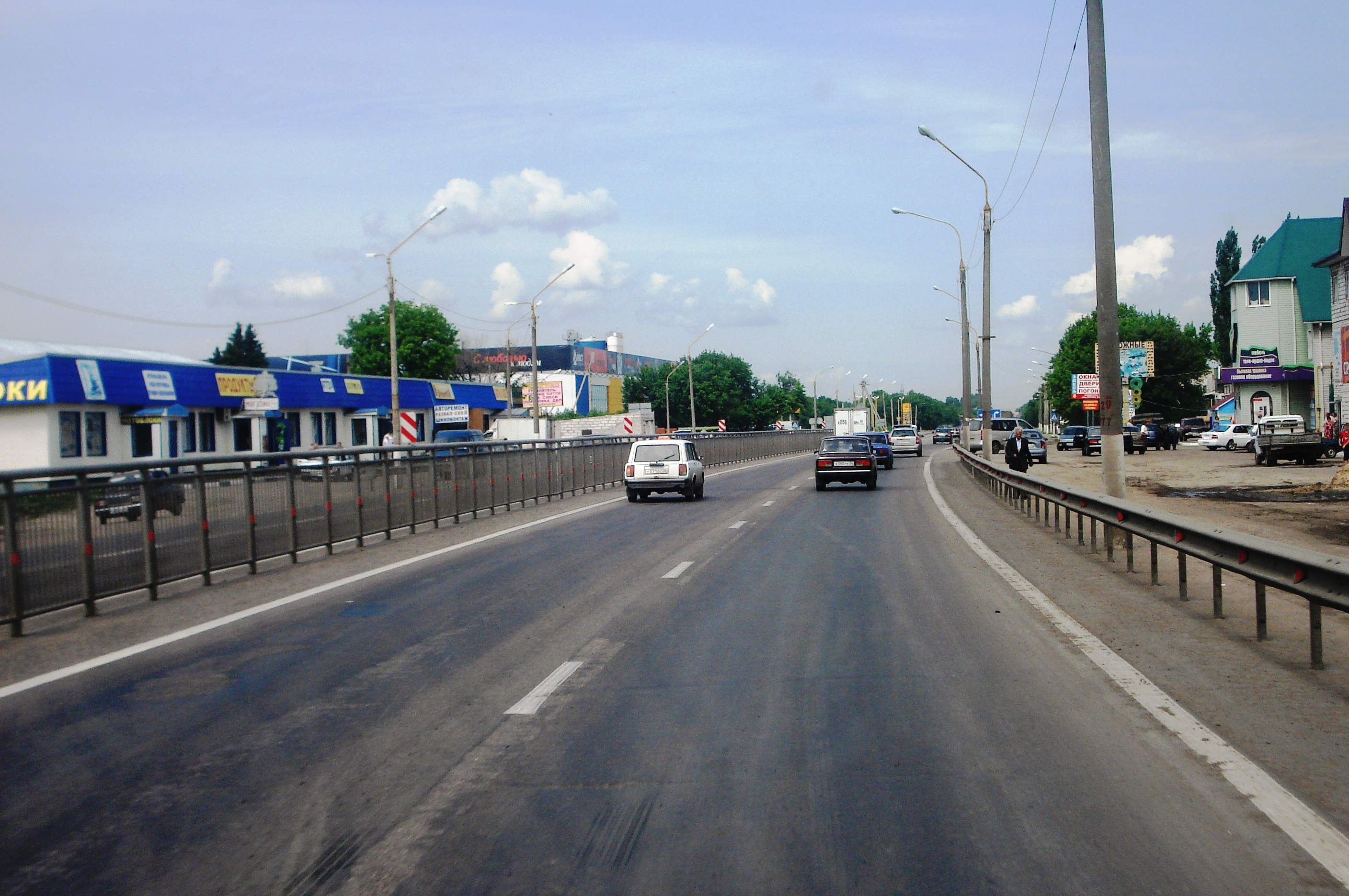 Шоссе М4 "Дон" в Новой Усмани